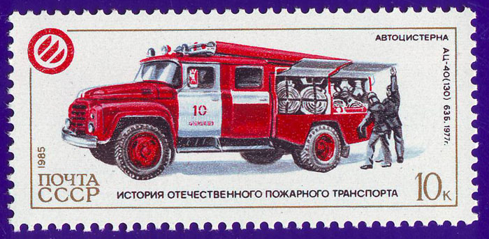 Почтовая марка Автоцистерна АЦ-40 (130) 63Б. 1977 г. Автор почтовой марки А. Аксамит